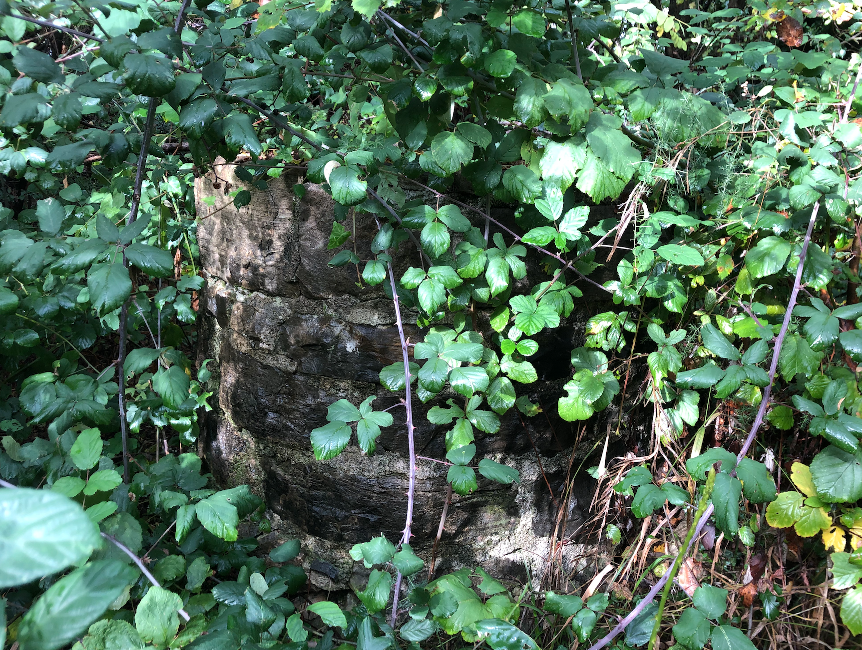 Castello di Soffumbergo - Pozzo